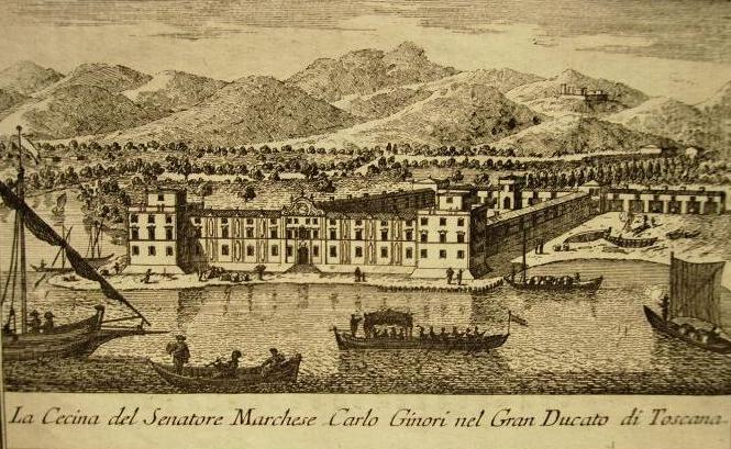 Incisione del 1751 ritraente il fiume Cecina e Villa Ginori